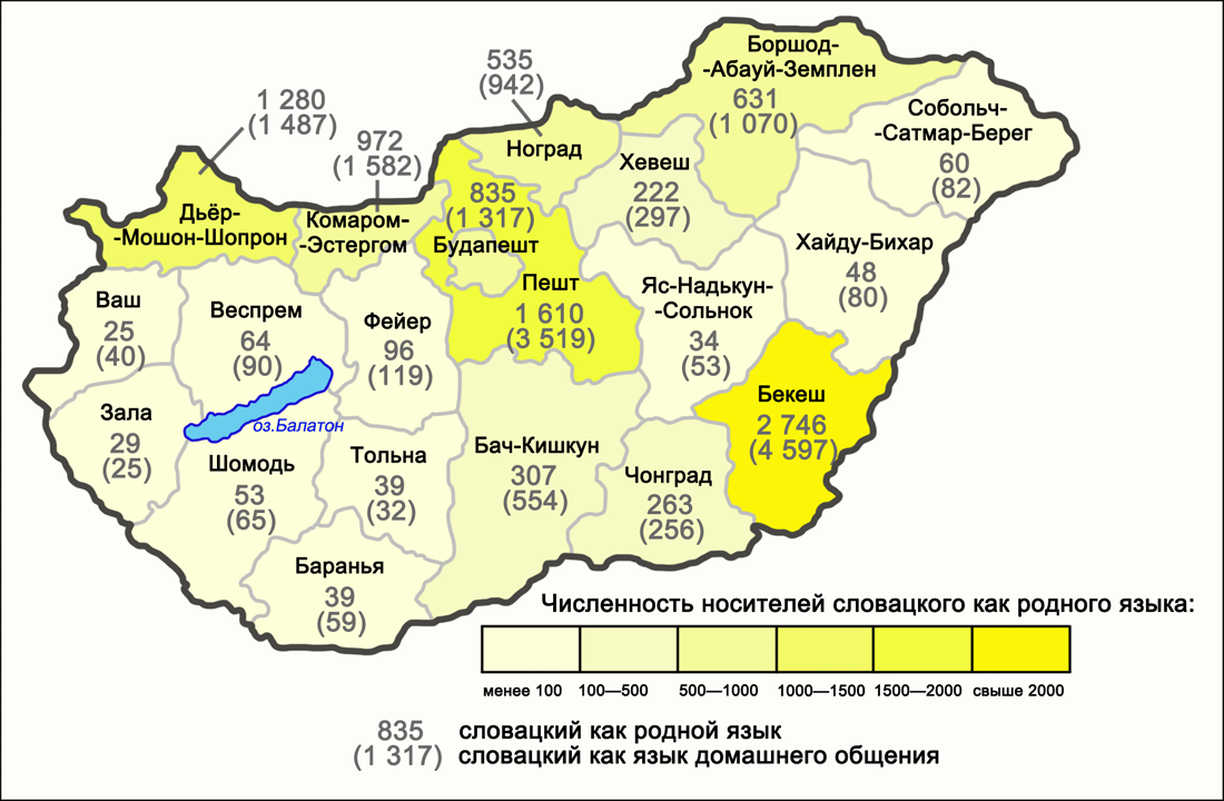 Численность носителей словацкого языка в областях Венгрии как родного (материнского) и как языка домашнего общения (обиходного). По данным переписи 2011 года в Венгрии: Hungarian central statistical office; Population census 2011. Data. National data. 1. Retrospective data 1.1. Number and characteristics of the population. 1.1.6. Nationality, mother tongue. 1.1.6.2. Population by nationality, mother tongue, language spoken with family members or friends and affinity with nationalities’ cultural values.